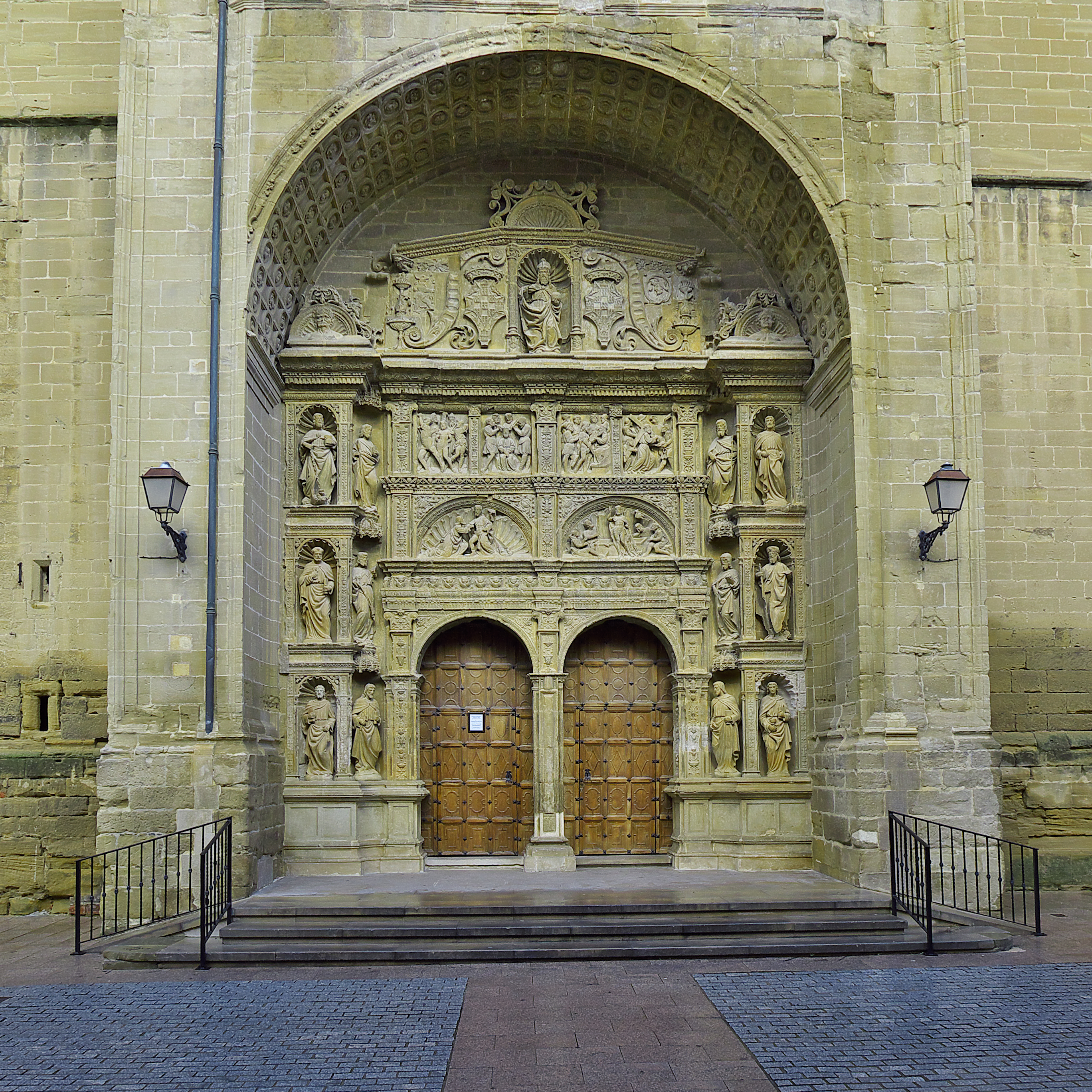 Felipe Bigarny muestra al apóstol Santo Tomás en una soberbia portada plateresca, siendo director de fábrica, Juan de Rasines (1516)